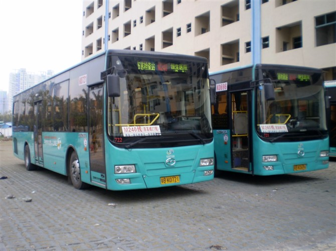 中文（中国大陆）: 深圳公交M240路FDG6111HEVG2（三踏）